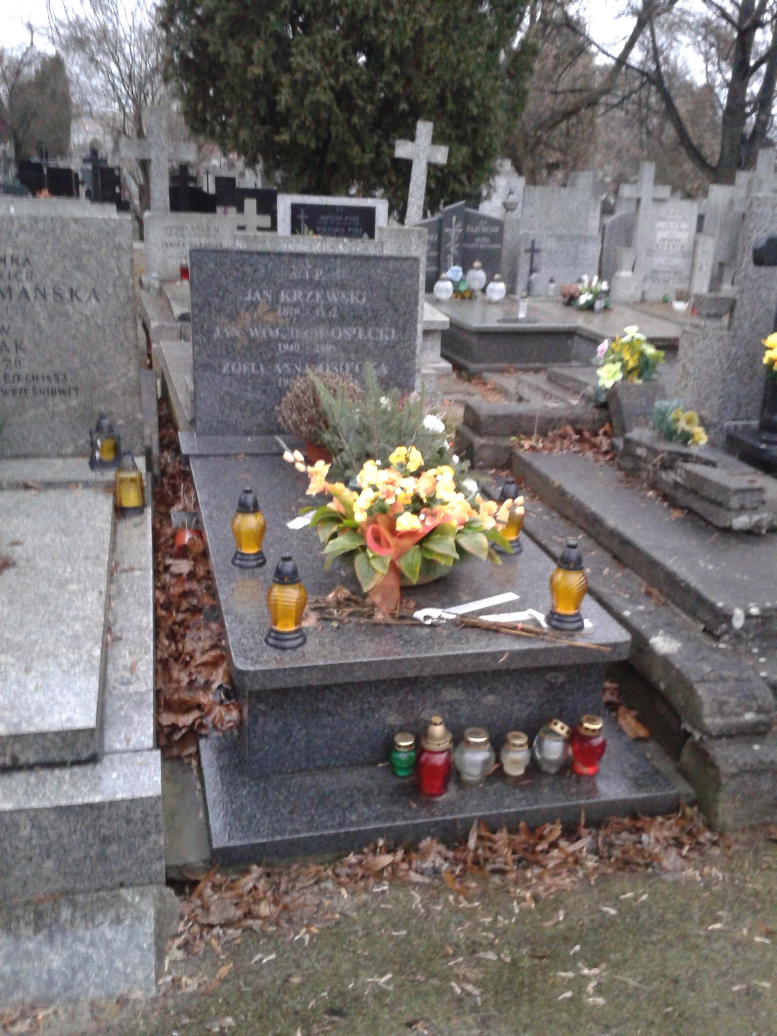 Grób rodzinny prof. Jana Osieckiego